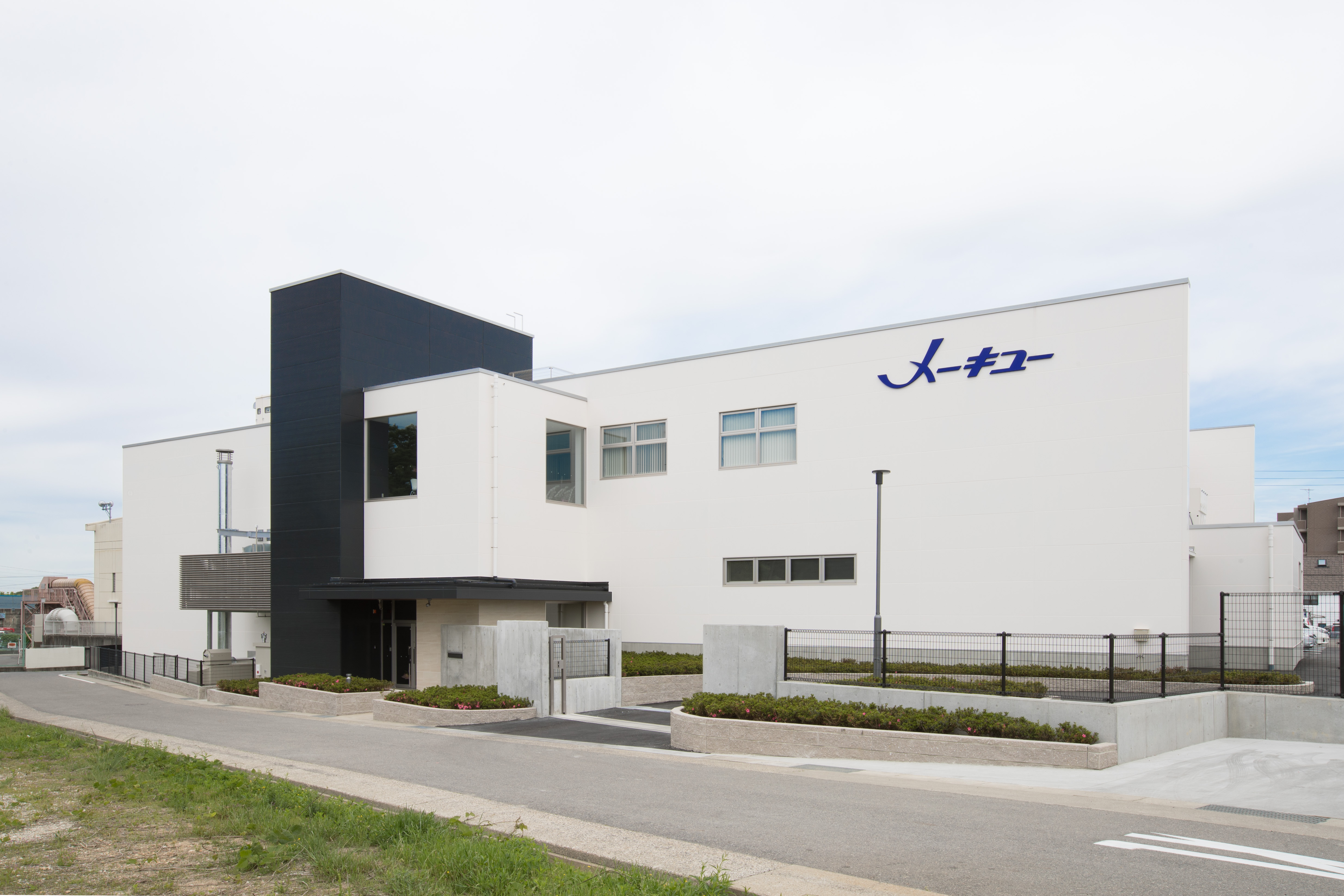 名古屋市守山区大字下志段味字池田のメーキュー本社を撮影